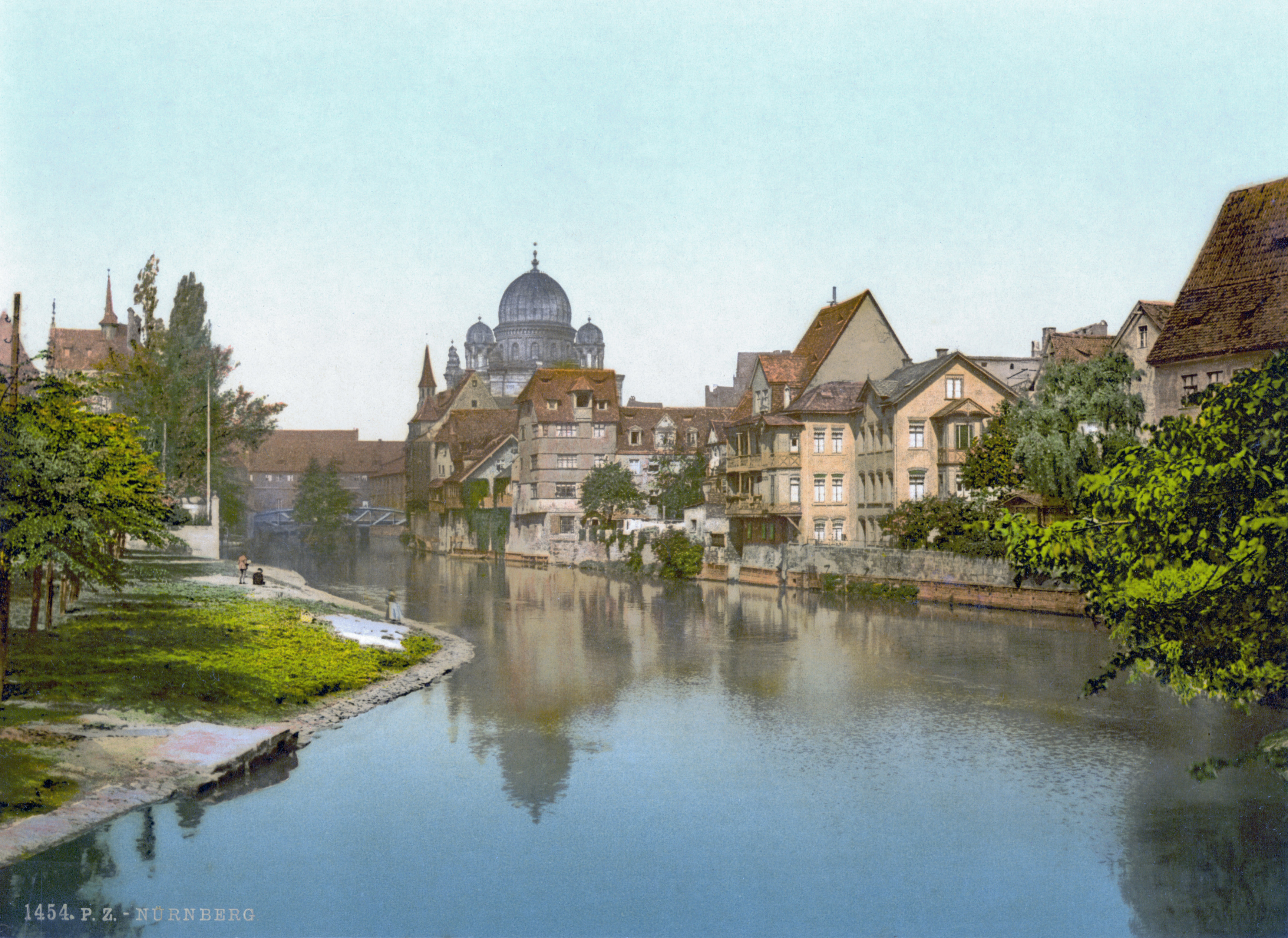 Nürnberg mit Pegnitz und Synagoge um 1900